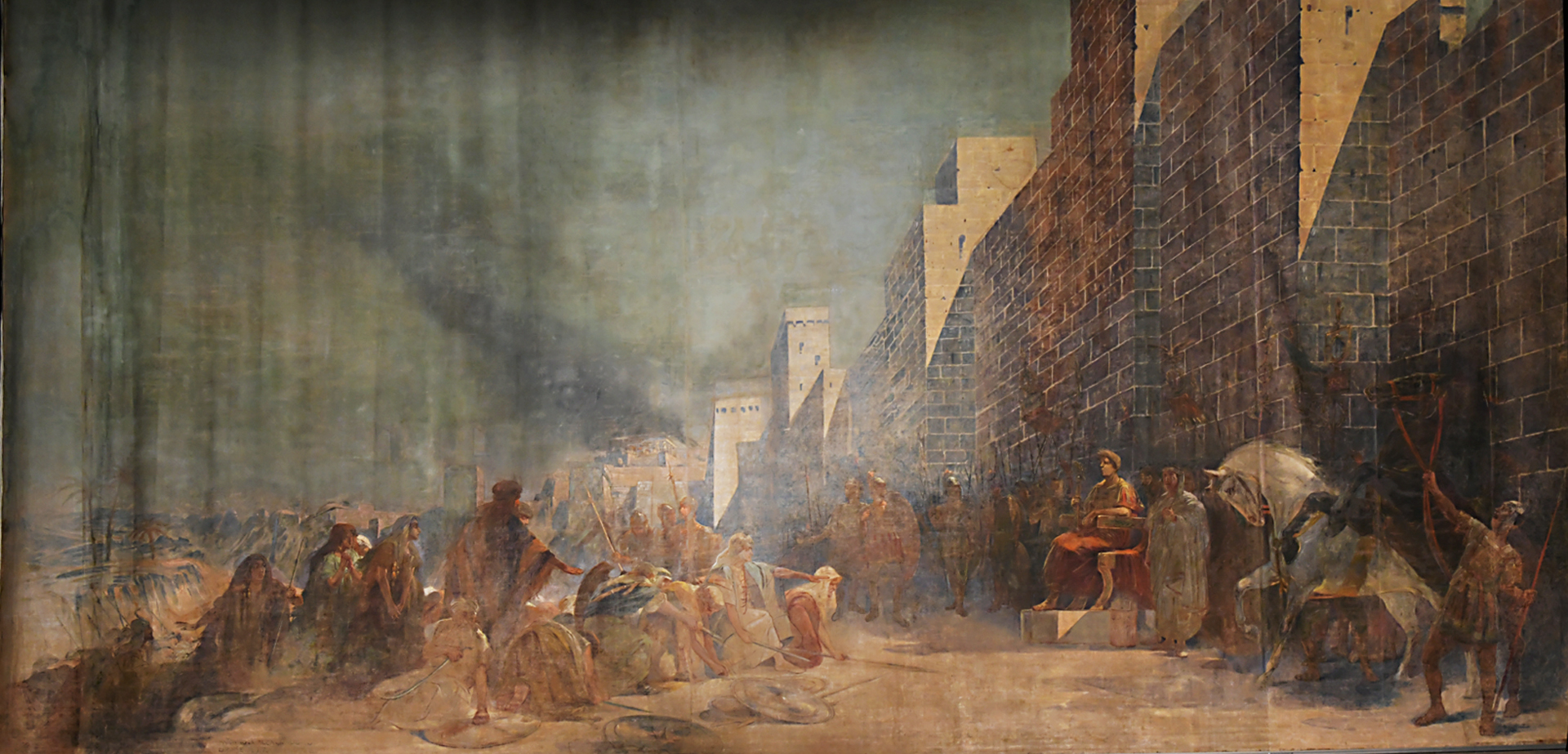 Teatro Flavio Vespasiano This is a photo of a monument which is part of cultural heritage of Italy. Questa è una foto di un bene culturale italiano che partecipa al concorso Wiki Loves Valle del Primo Presepe 2019, gestito in coperazione con Wikimedia Italia. This is a photo of a monument which is part of cultural heritage of Italy. This monument participates in the contest Wiki Loves Valle del Primo Presepe 2019, operated in cooperation with Wikimedia Italia.